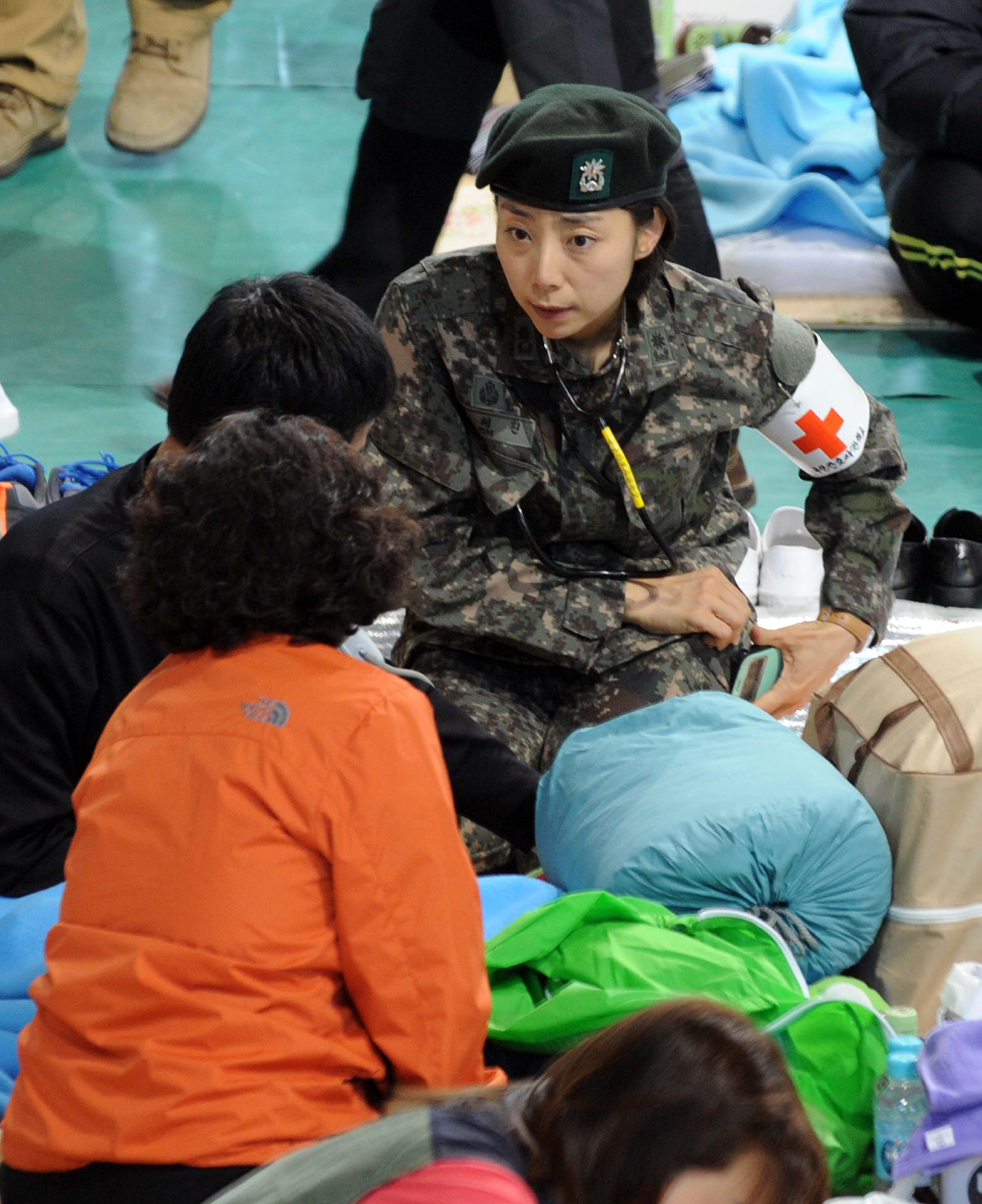 여객선'세월호' 침몰사건 엿새째를 맞은 21일 전남 진도군 실내체육관에서 국군간호사관학교 장교가 실종자 가족에게 의료지원봉사를 하고 있다. 촬영 - 김태형 기자